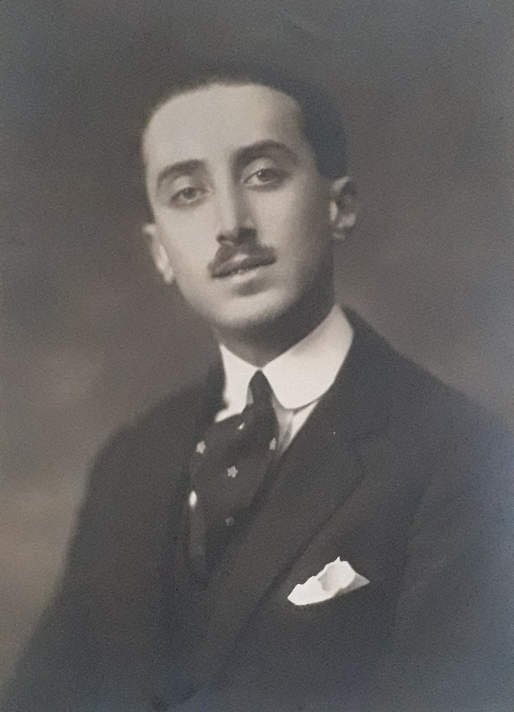 Il Dr .Cav.Gr.Uff. Mario Pontremoli in età giovanile, foto scattata da Giovannicaciotta